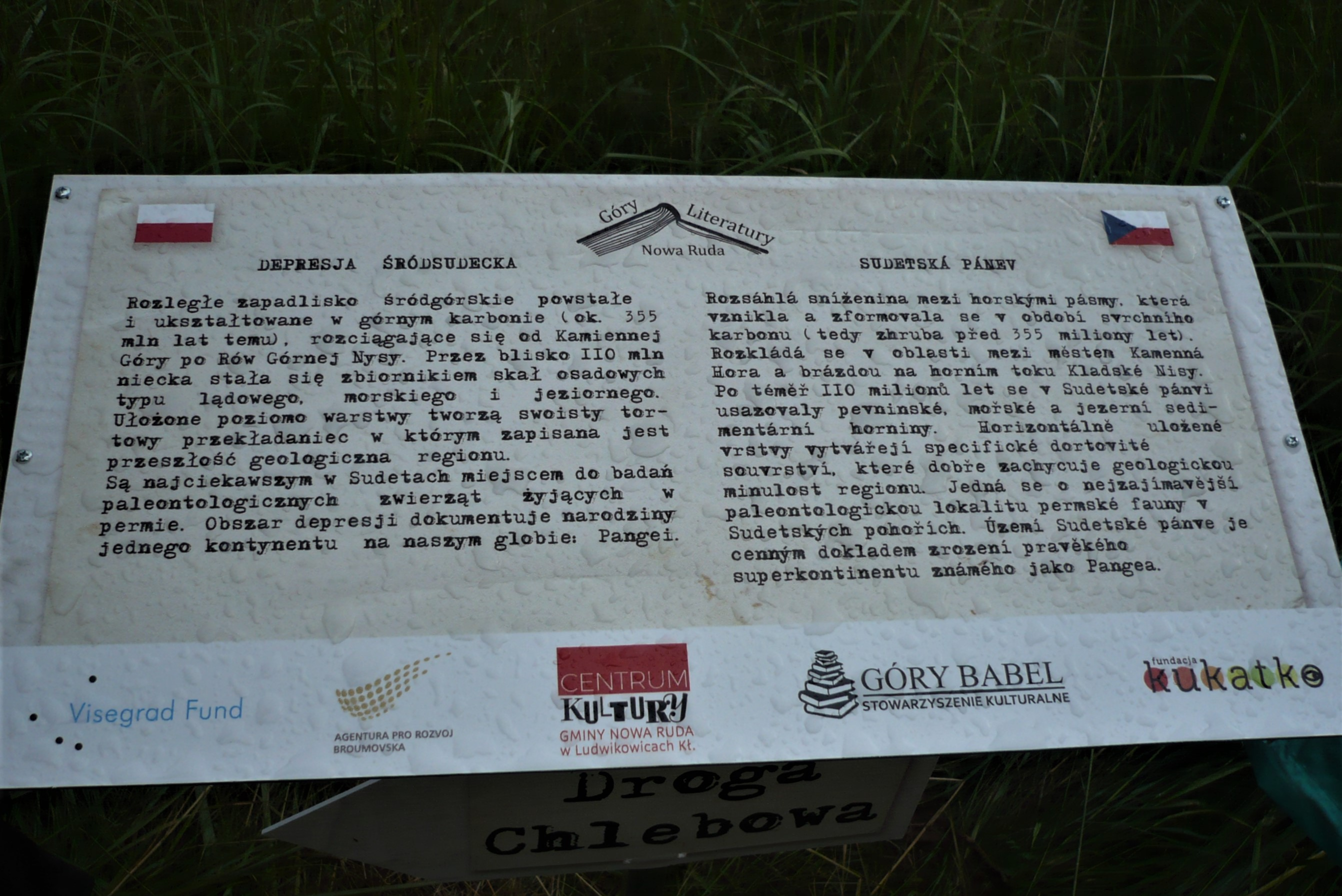 Tablica na Drodze Chlebowej Sonov - Włodowice